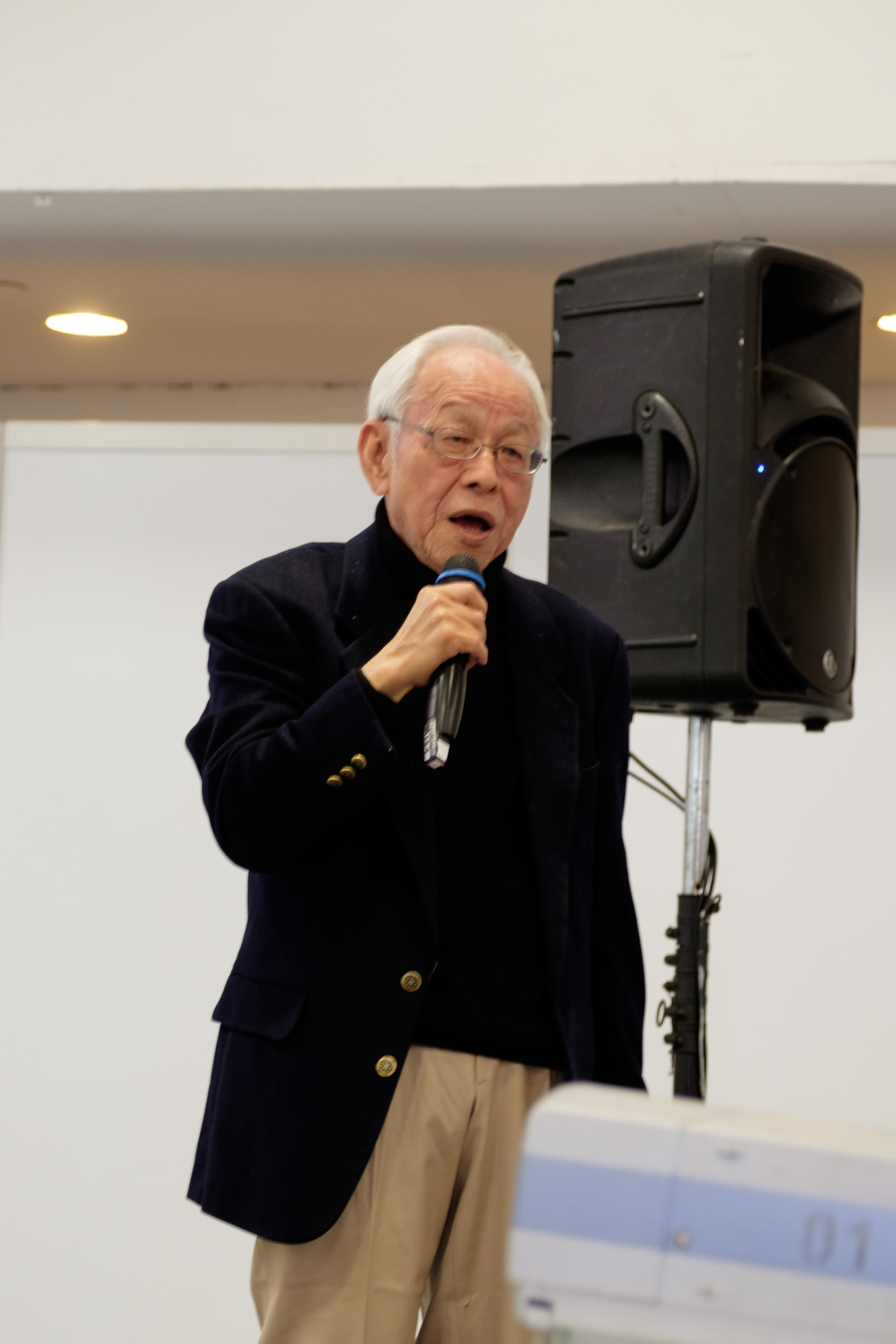 2016臺北國際書展第五日上午，高信譚於世貿一館黃沙龍主講歷史小說-從匈牙利的《匈奴秘境》與中近東的《阿拉伯人眼中的十字軍東征》談起。